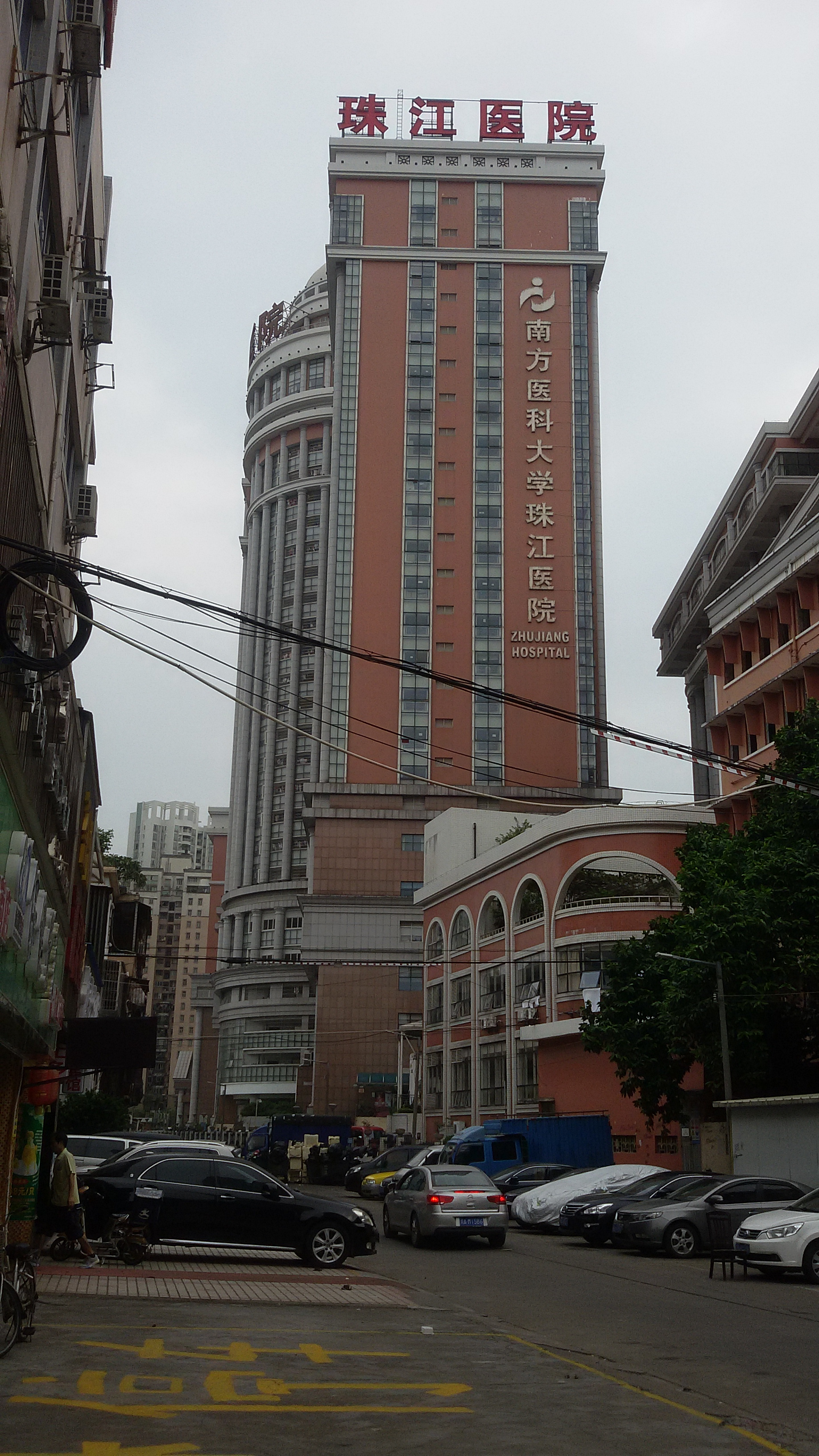 粵語: 南方医科大学珠江医院